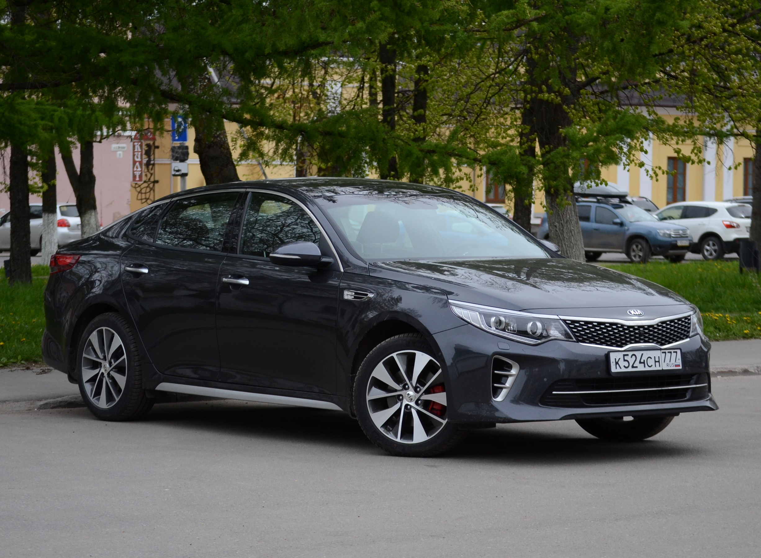 Седан Kia Optima четвёртого поколения (JF)